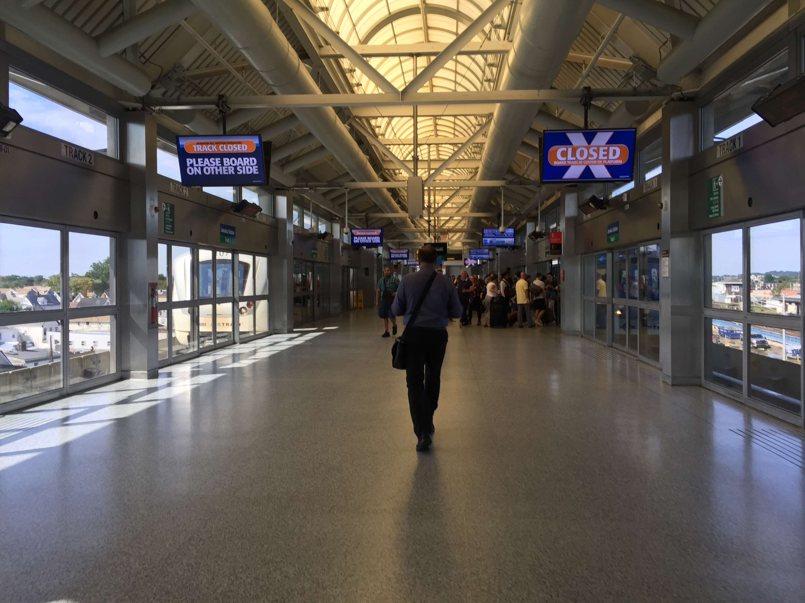 2017-08-23 09.55.20 HDR